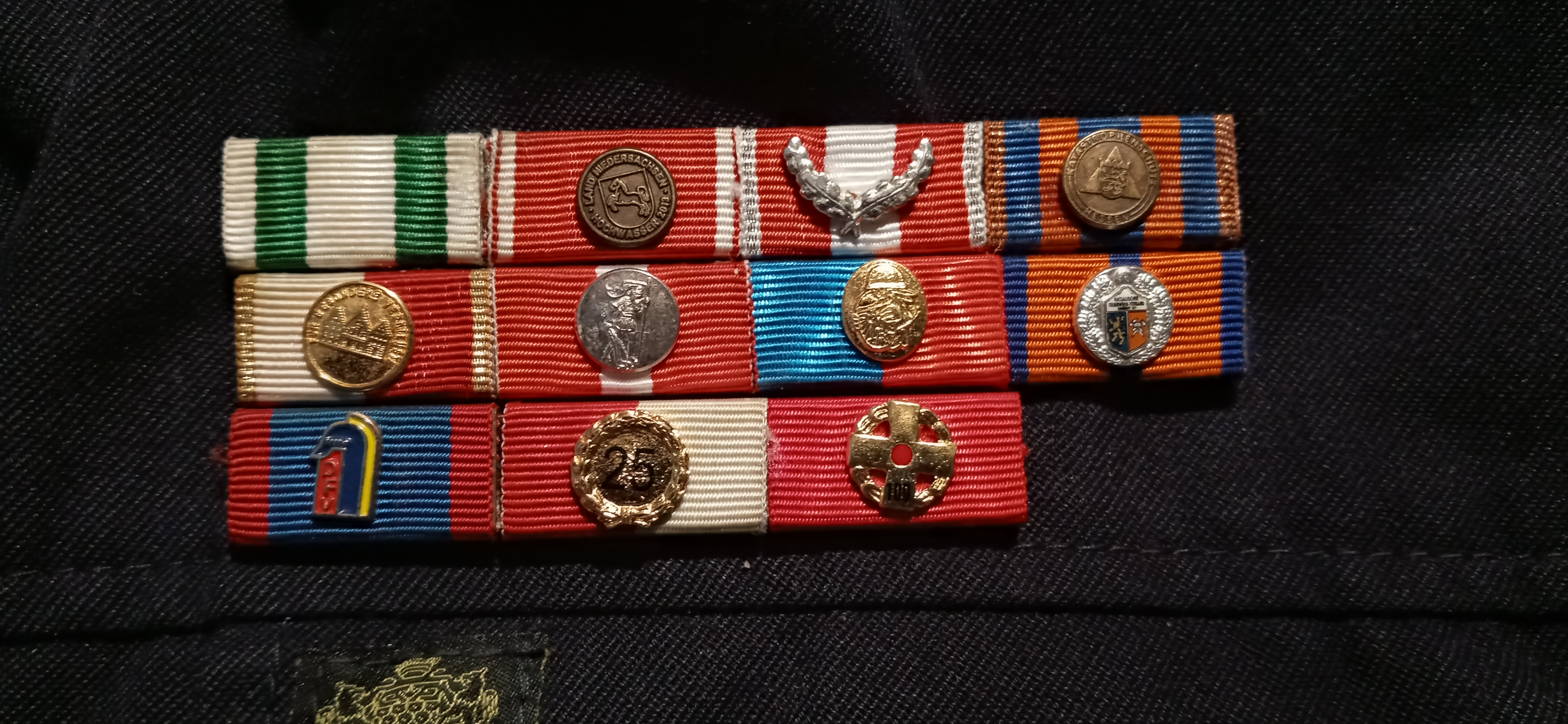 Ehrenabzeichen Feuerwehr (Deutschland)--- oberste Reihe: Fluthelfer Sachsen 2002 / Fluthelfer Niedersachsen 2013 / Brandschutzehrenzeichen am Bande 25 Jahre / Katastrophenschutz-Medaille in Bronze --- mittlere Reihe: Römer-Plakette in Gold / Floriansmedallie in Silber / Ehrenauszeichnung der Stadt JF-Frankfurt in Gold / Ehrenmedallie des Nass. Feuerwehrverbandes in Silber--- untere Reihe: Tradionsabzeichen der dt. Feuerwehr / Vereinsabzeichnen 25 Jahre / Blutspende (100x) /